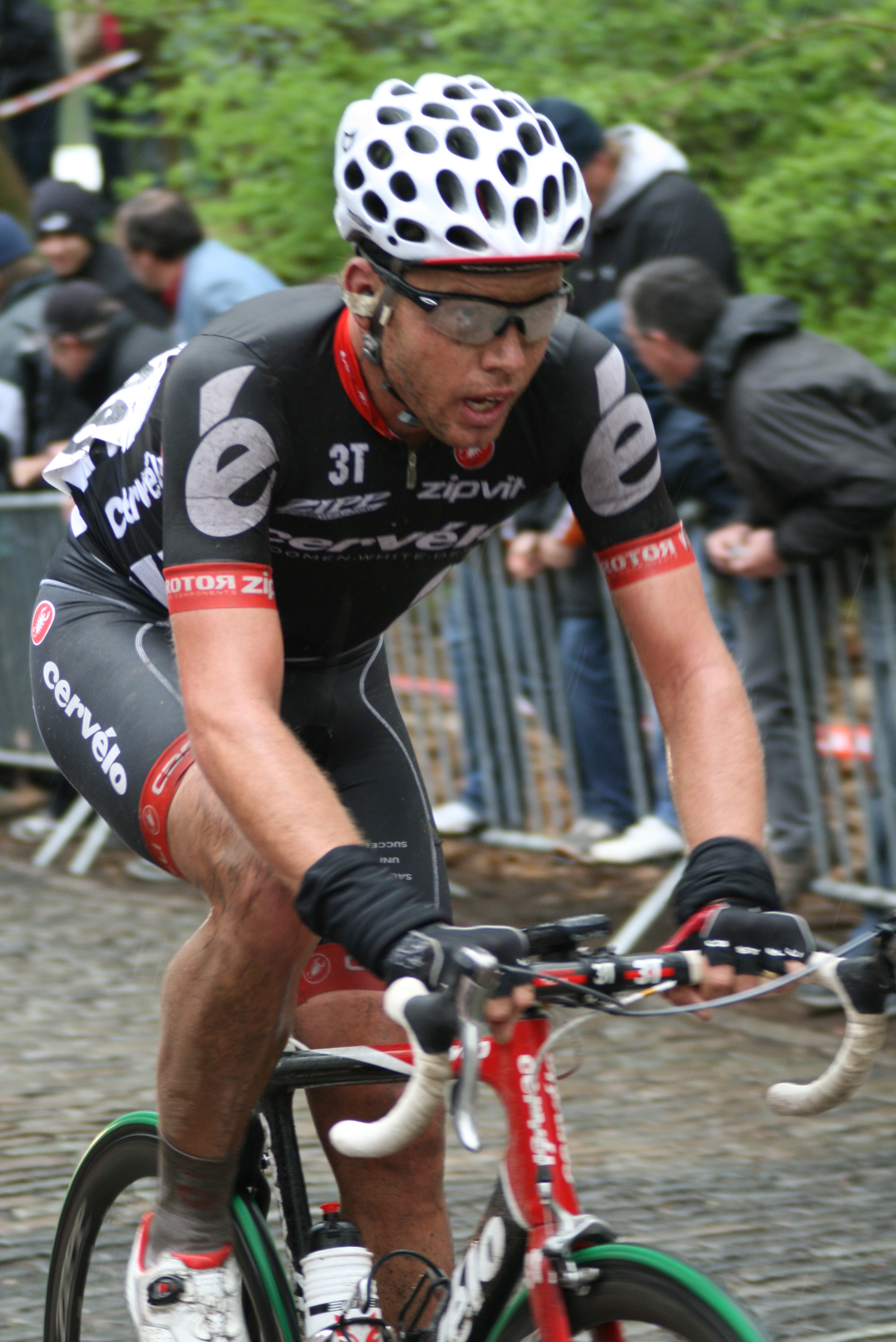 Gent-Wevelgem 2009 : Brett Lancaster au mont Kemmel